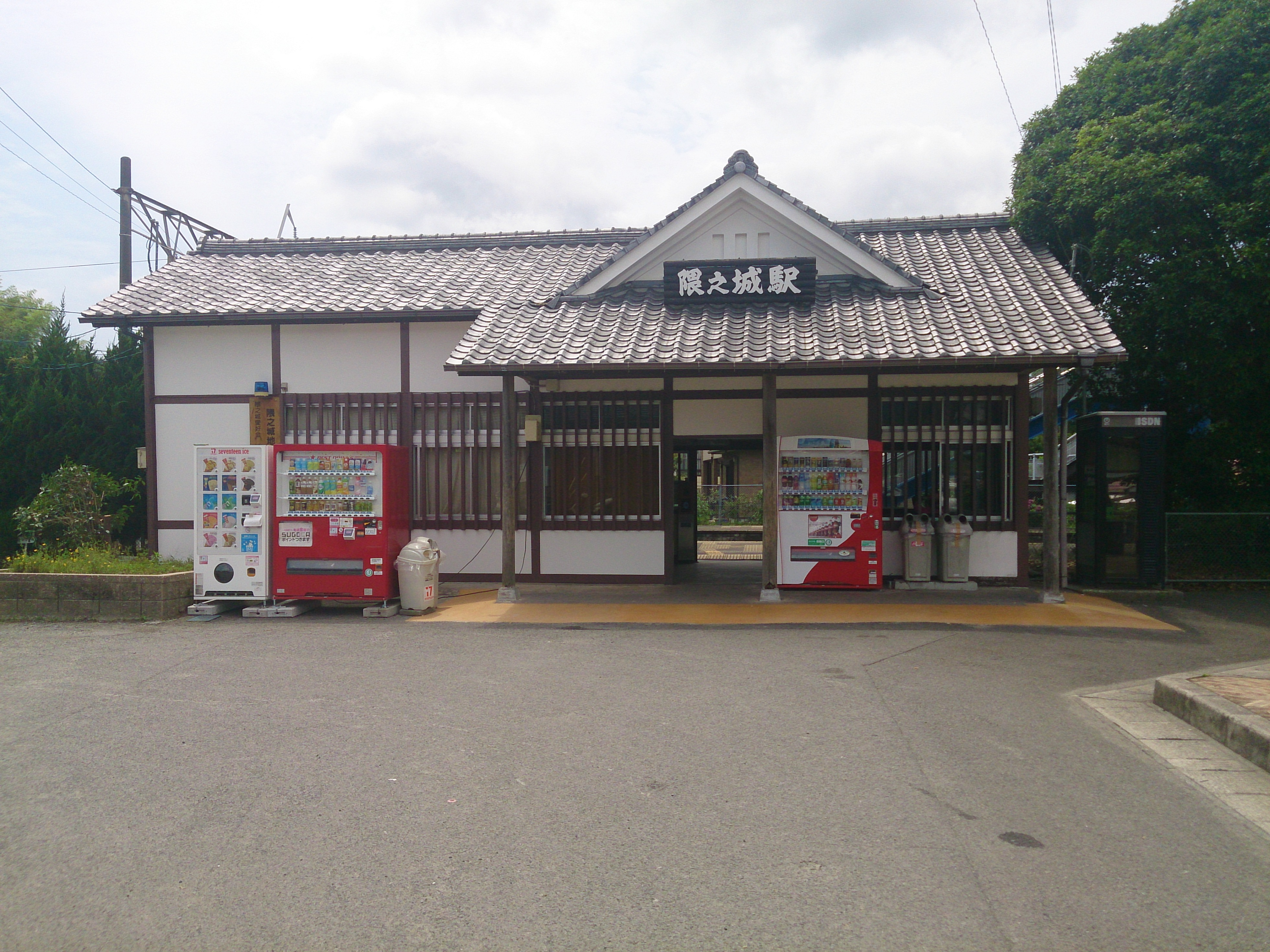 隈之城駅駅舎